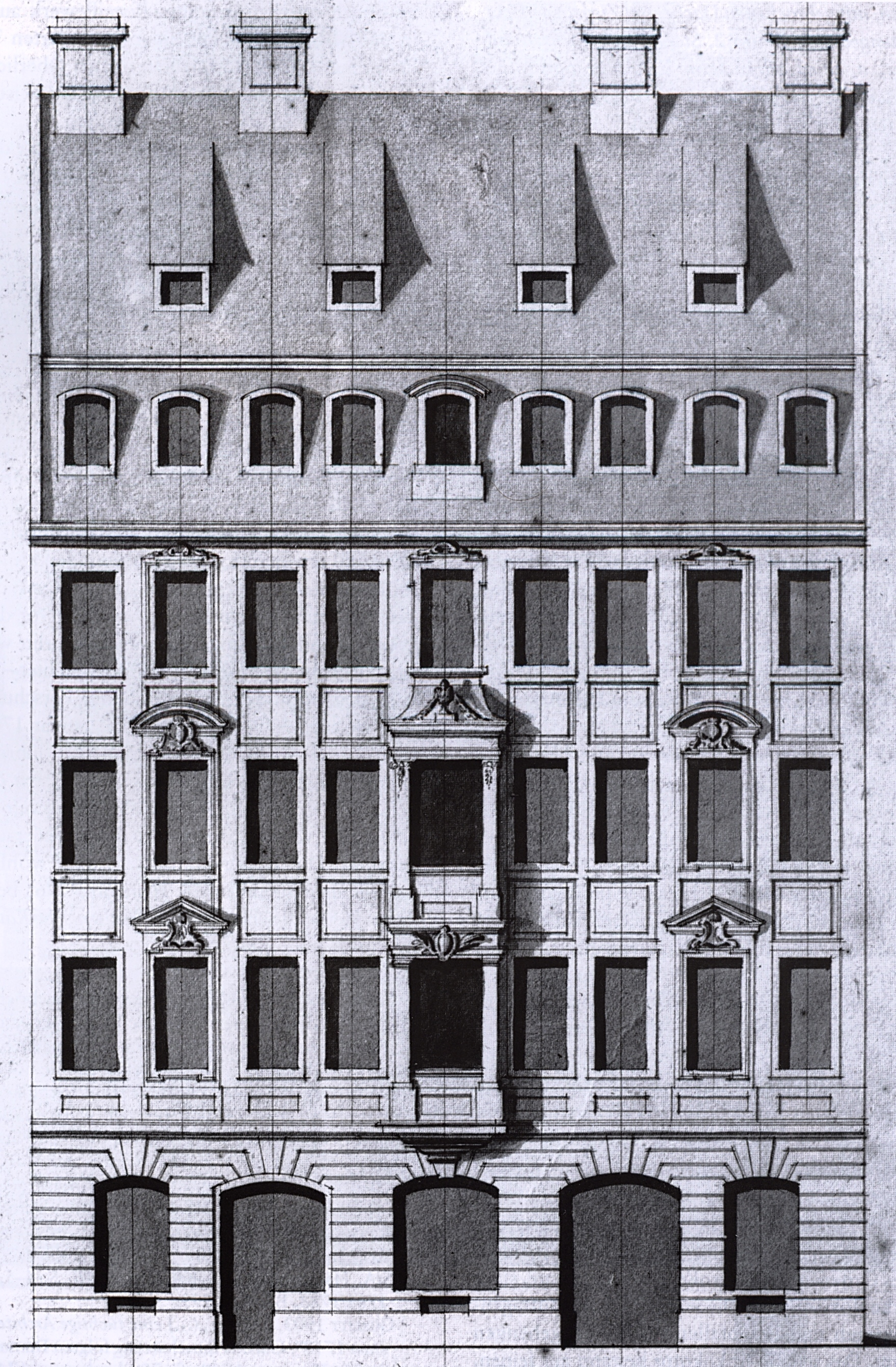 Entwurf des Samuel Gotthelf Locke (1710-1793) für das Haus an der Frauenstraße 7 in Dresden, das nach der italienischen Kaufmannsfamilie Chiapponi benannt wurde